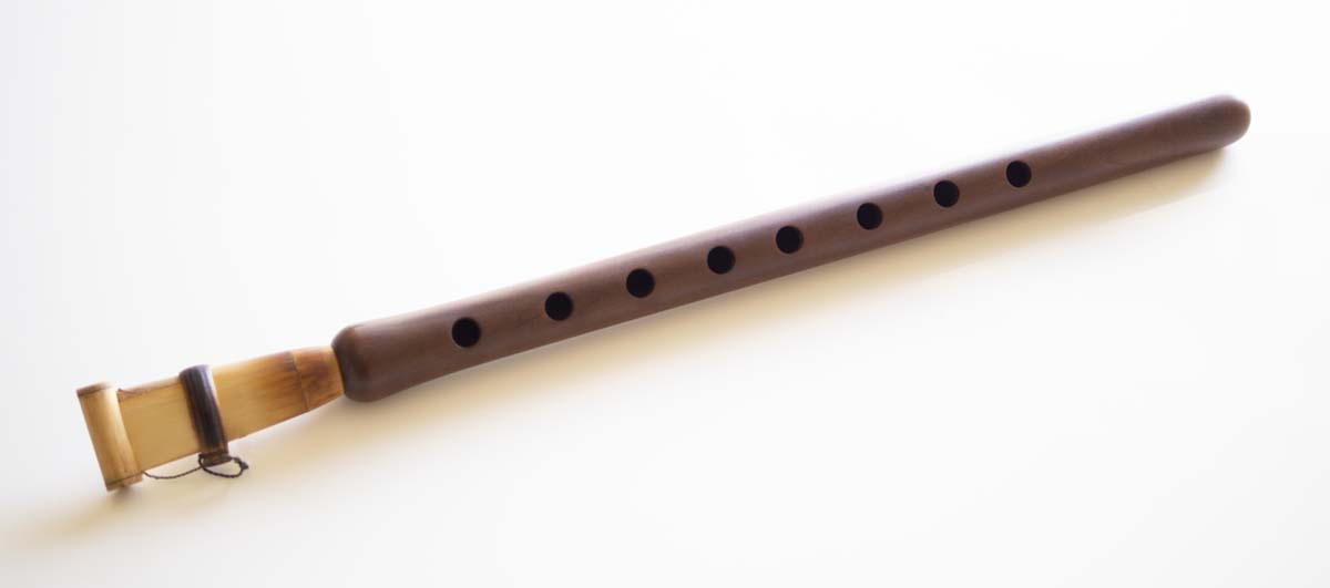 アルメニア共和国の伝統楽器ドゥドゥクの写真